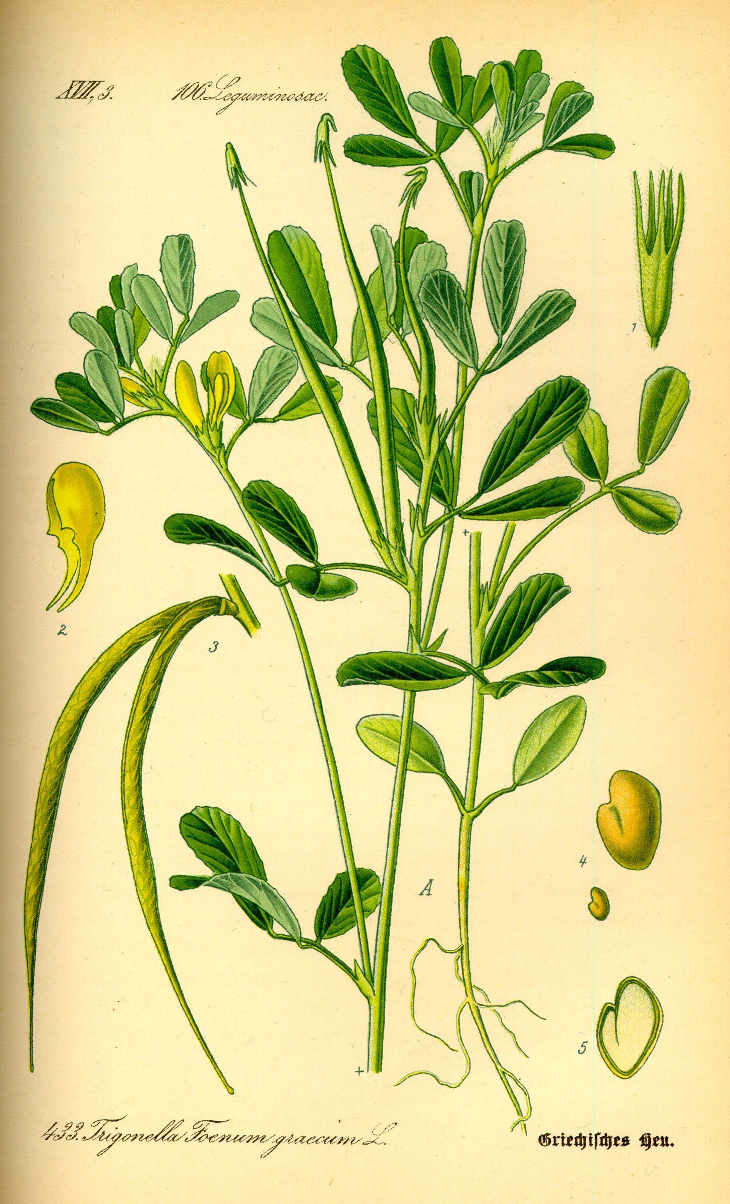 Trigonella foenum-graecum.